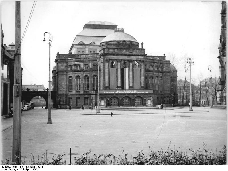 Chemnitz, Opernhaus Zentralbild Schlegel 30.4.1956 Stadtansichten von Karl-Marx-Stadt Am 10. Mai 1956 werden die Teilnehmer an der Friedensfahrt Warschau-Berlin-Prag im Etappenort Karl-Marx-Stadt eintreffen. Dort wird auch der letzte Ruhetag für die "Giganten der Landstrasse" sein. UBz: Ein Blick auf das Opernhaus in Karl-Marx-Stadt.